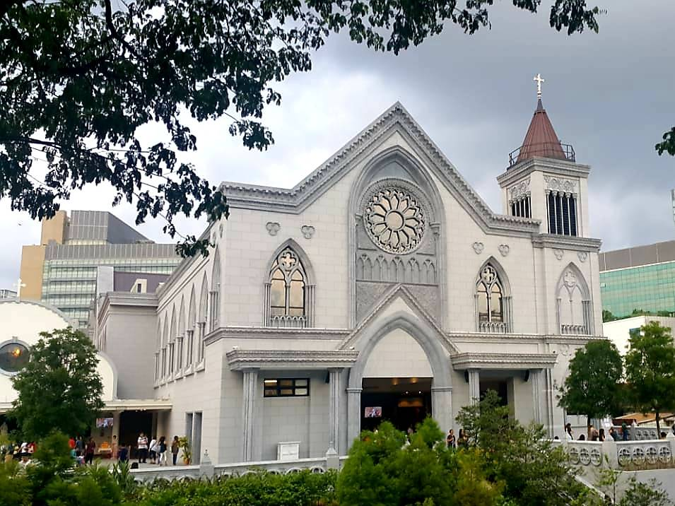 Tampak luar Gereja Novena, Singapura